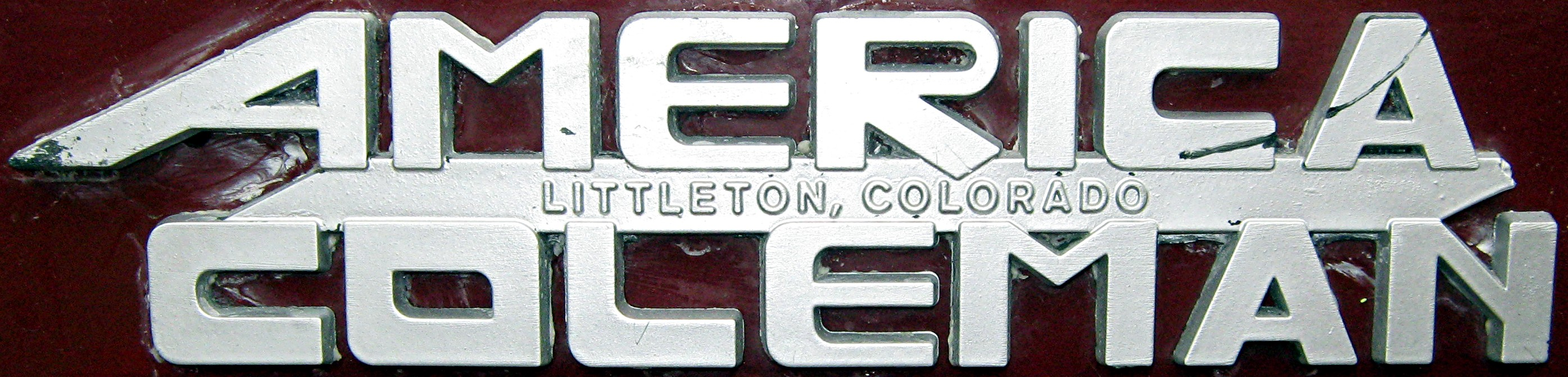 American Coleman Flughafen-Schlepper, Baujahr 1961, 4 Zylinder, 73 KW